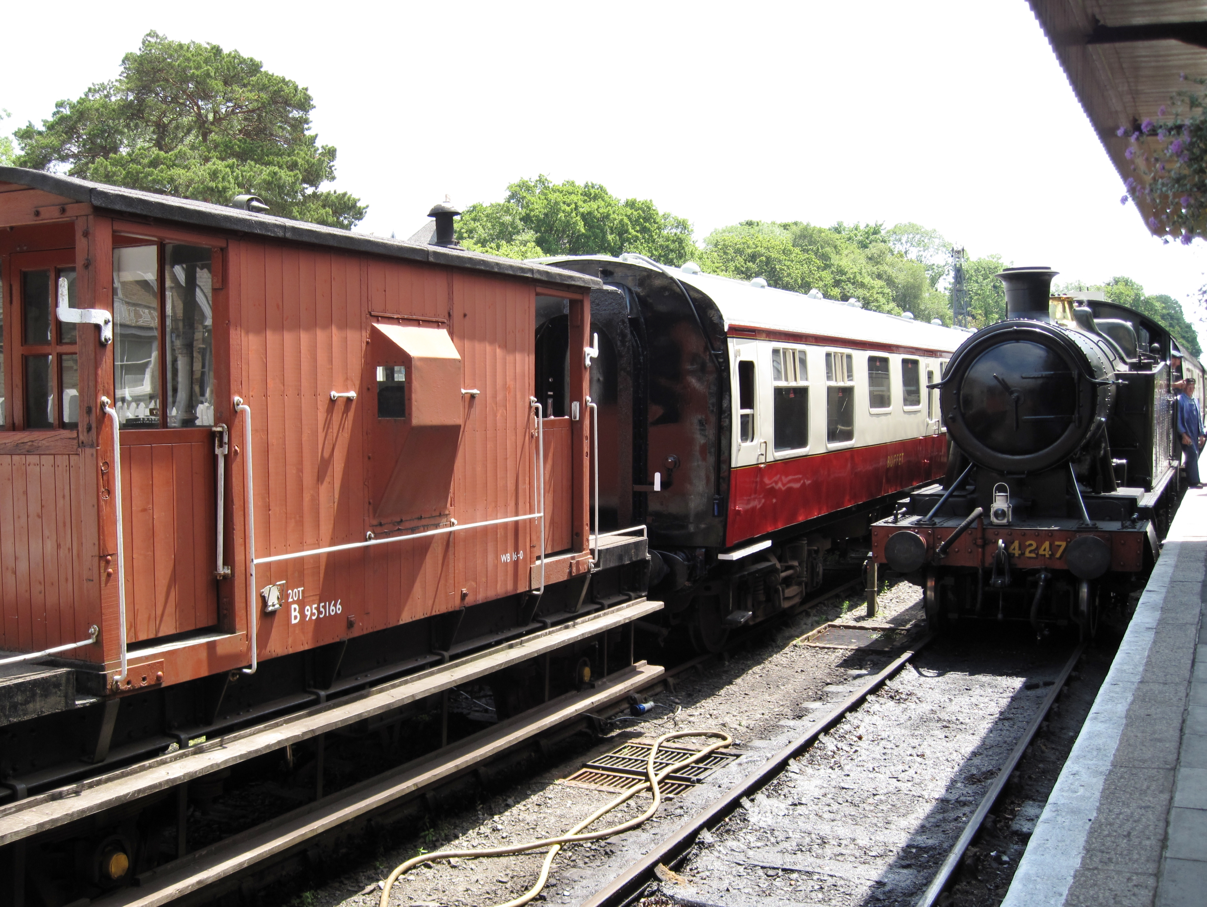 Museumszug im Bahnhof Bodmin General in Bodmin, Cornwall, Großbritannien